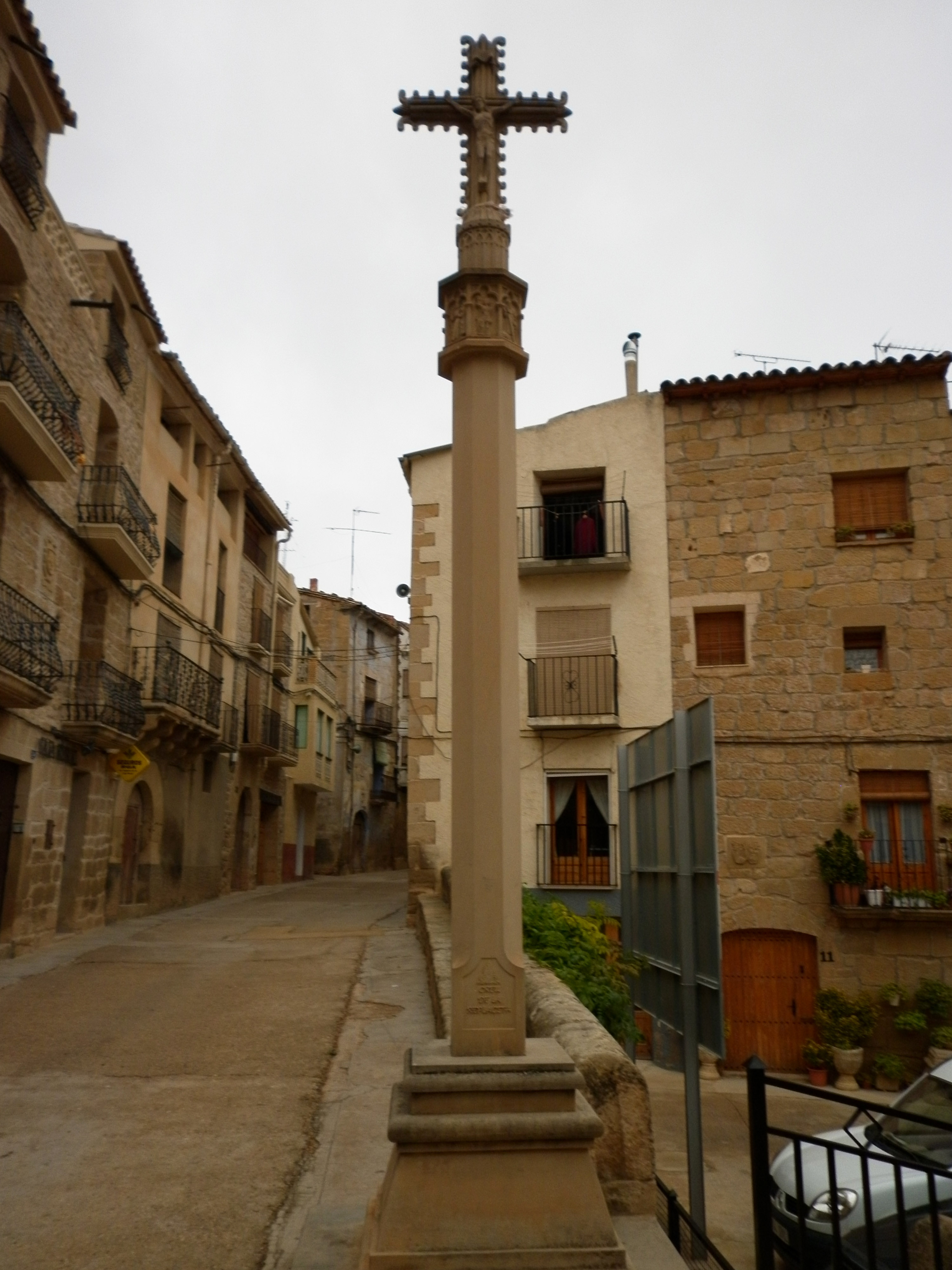 Cruz de la Replaceta (Mazaleón, Teruel - 2003)